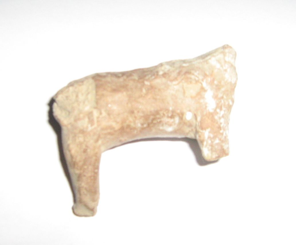 Zoomorfne figurica pronađena na gradini Klinac grad, karakteristična za kulturu Kolapijana